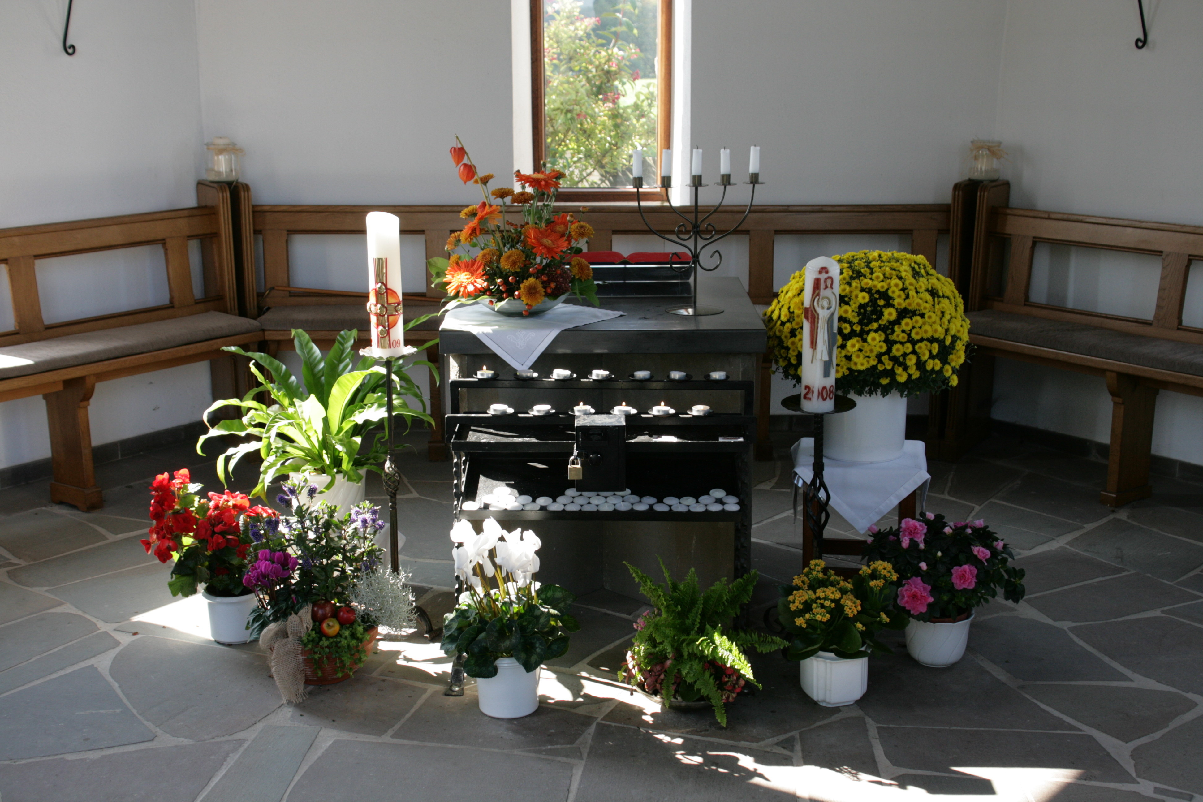 Ökumenische Schöpfungskapelle in Lindlar-Remshagen